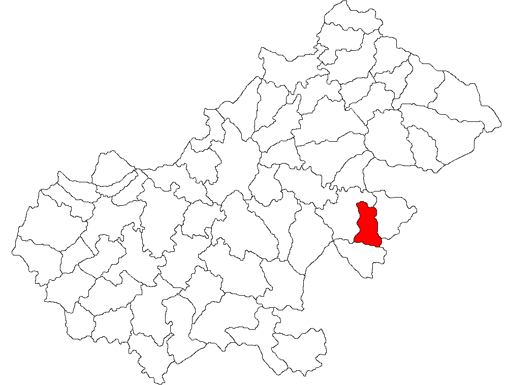 Categorie:Hărţi ale judeţului Satu Mare